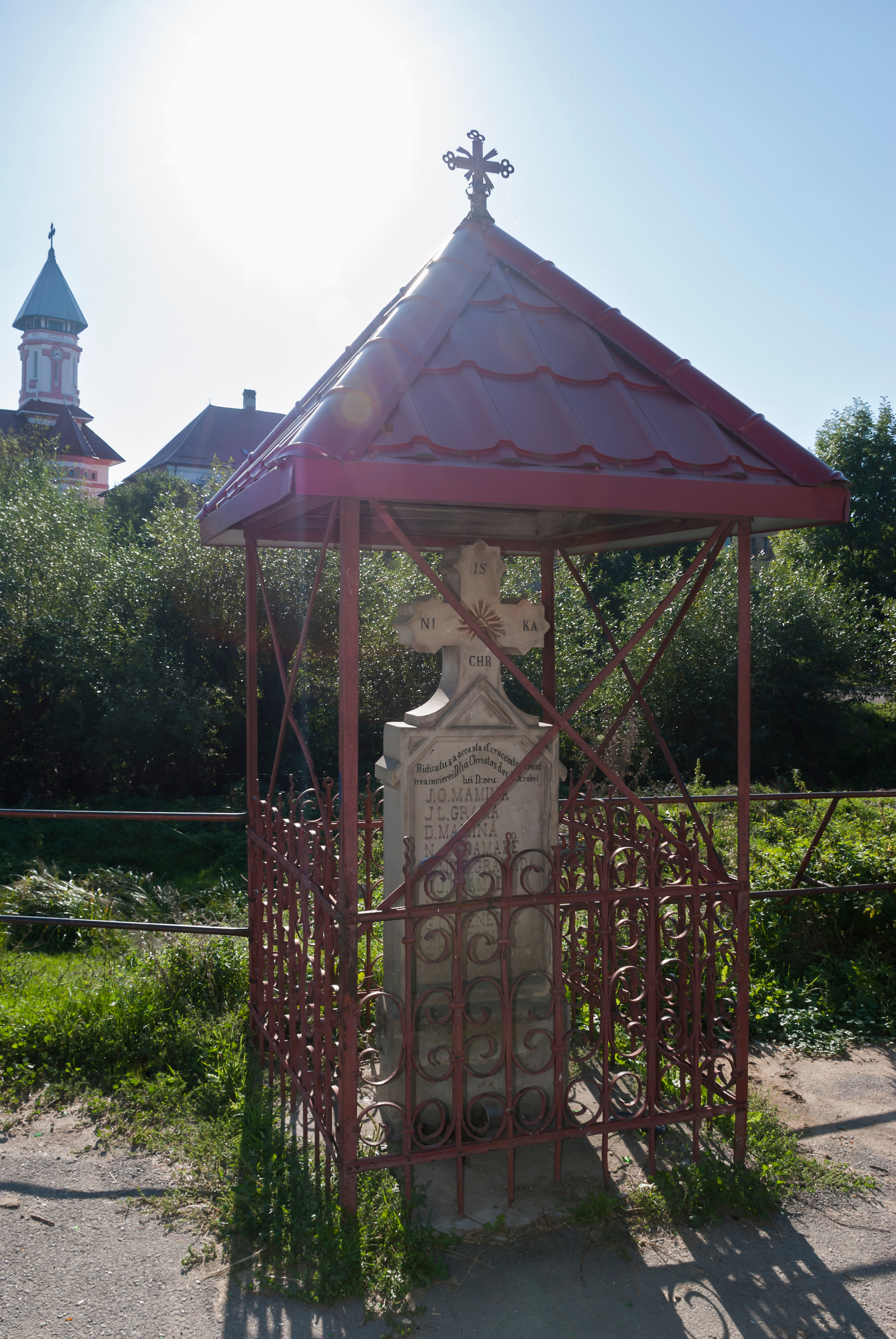 sec XVIII-XIX